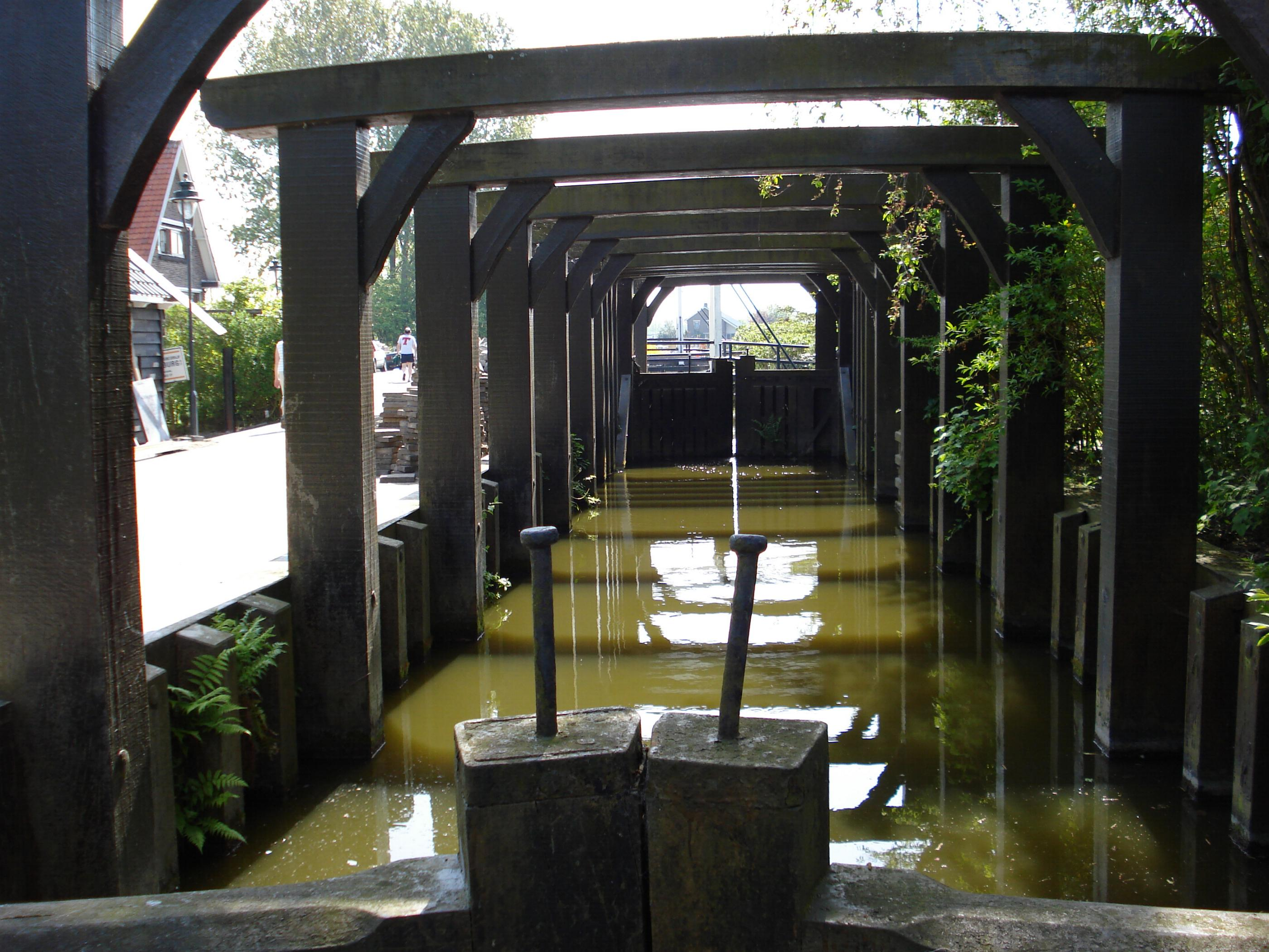 Rotterdam, Terbregse Rottekade. Boterdorpse verlaat. Sluis. Rijksmonument.